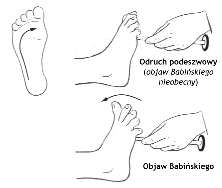 Grafika do artukułu: Objaw Babińskiego